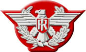 Fregio da Generale di Brigata e Divisione, esercito italiano